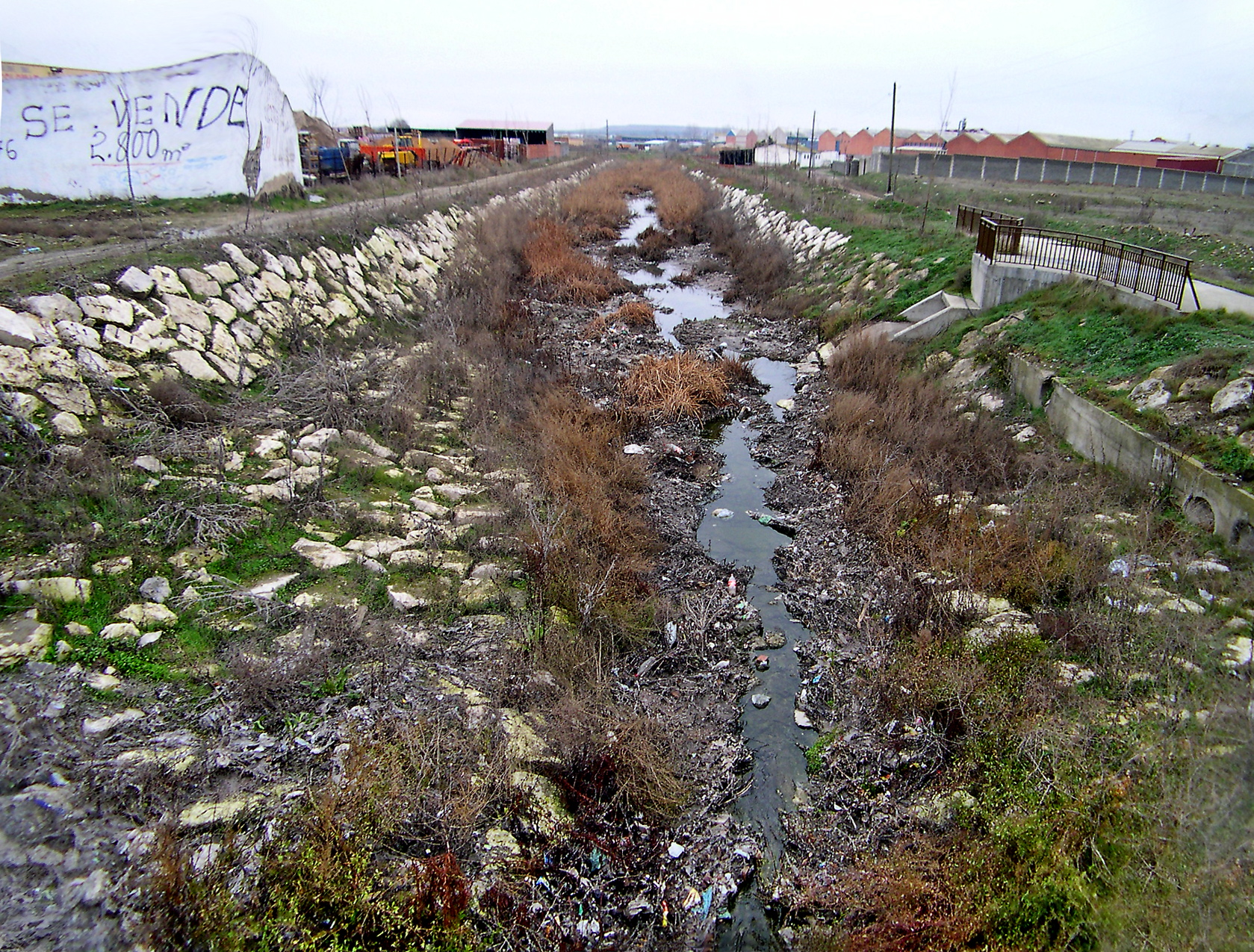 Río Zapardiel, lamentable estado en el que se encuentra a su salida de Medina del Campo (Provincia de Valladolid, España)